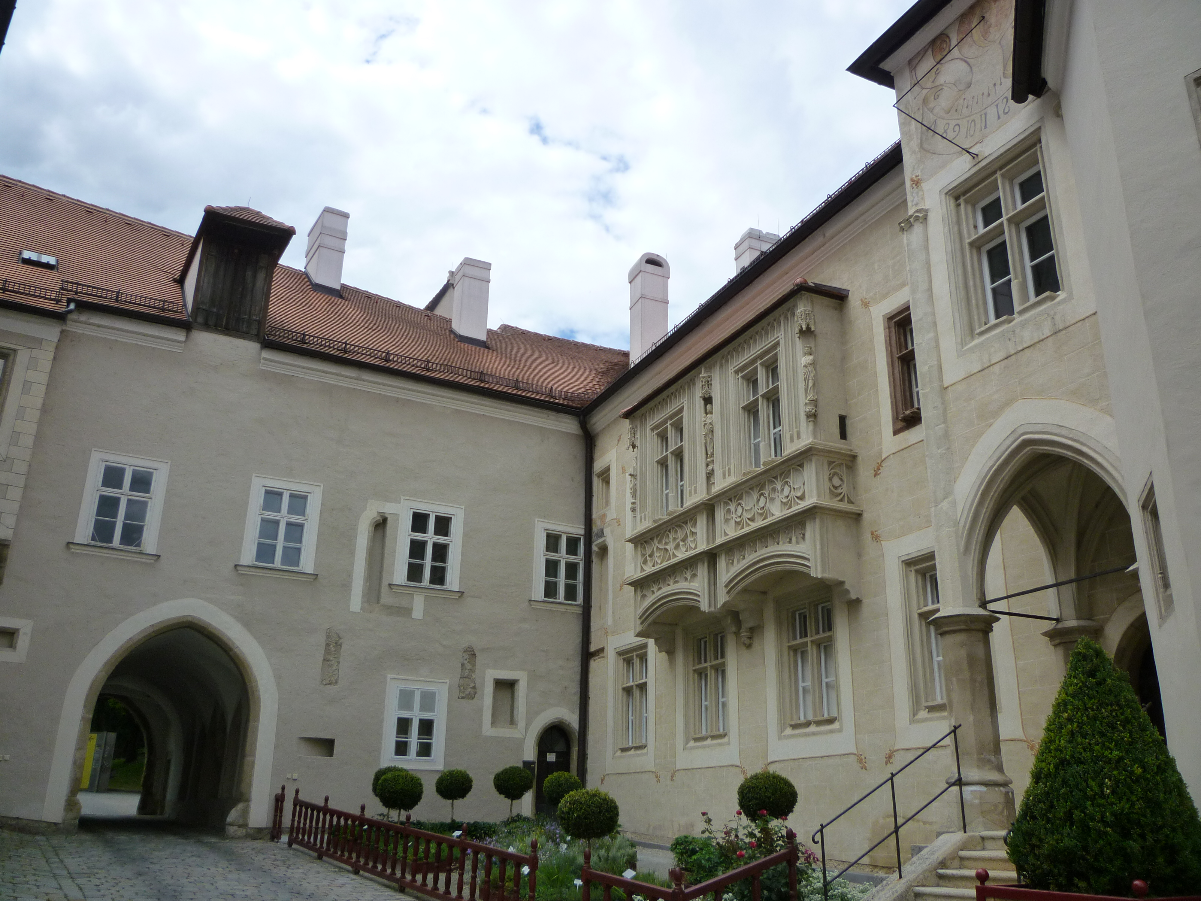 Ehemalige Markgrafenburg von Stift Klosterneuburg (12. Jahrhundert mit spätgotischer Fassadengestaltung)